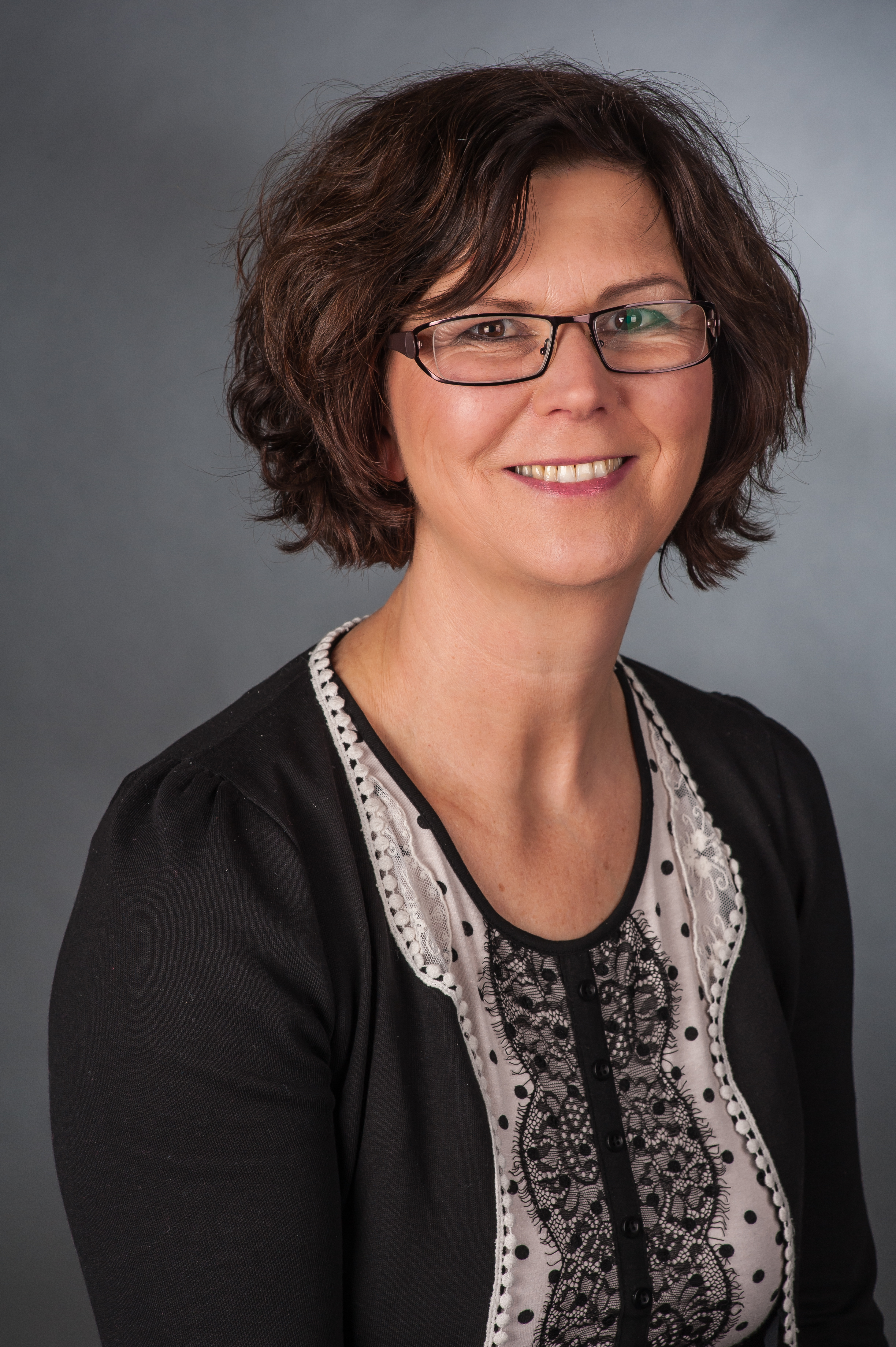 Susanne Menge (Bündnis 90/Die Grünen), Mitglied des Niedersächsischen Landtages. Wikipedia im Landtag – Niedersachsen 17. bis 18. April 2013 in Hannover Personality rights warningAlthough this work is freely licensed or in the public domain, the person(s) shown may have rights that legally restrict certain re-uses unless those depicted consent to such uses. In these cases, a model release or other evidence of consent could protect you from infringement claims.